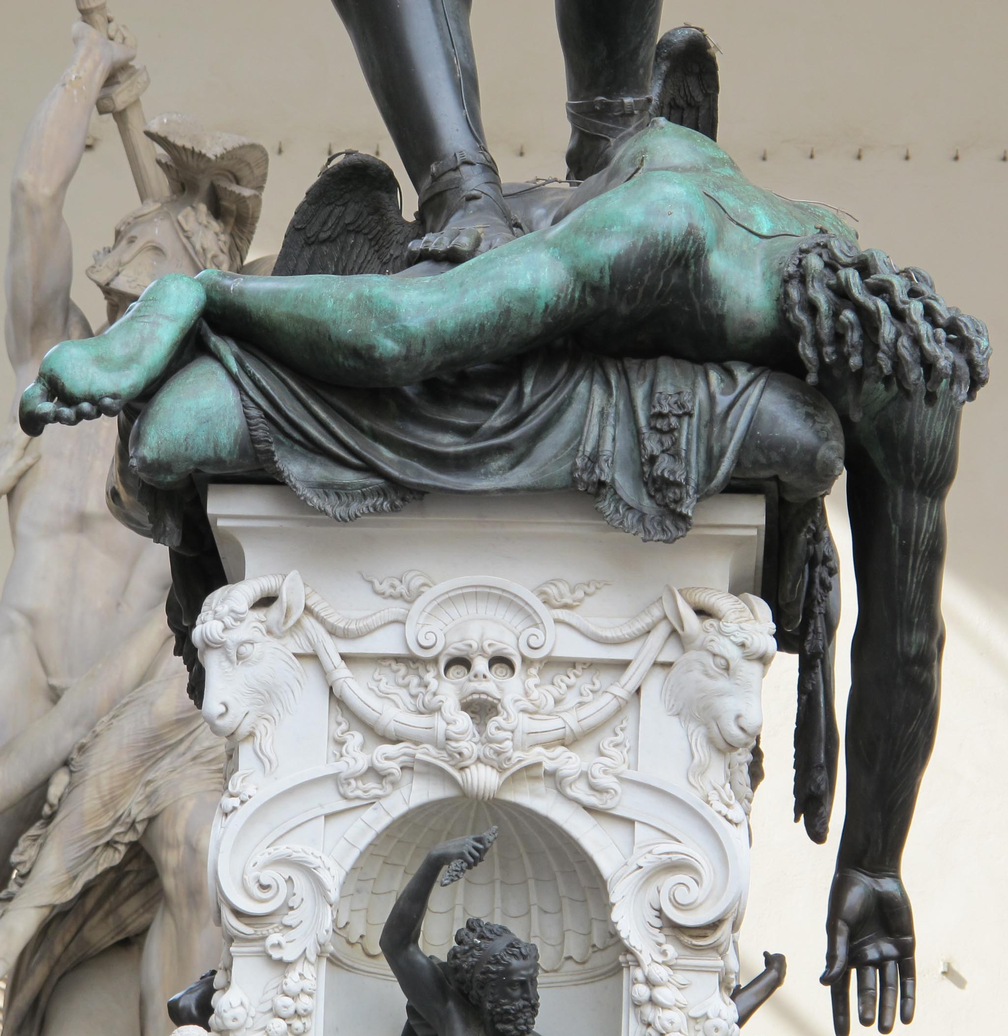 Cellini, perseo